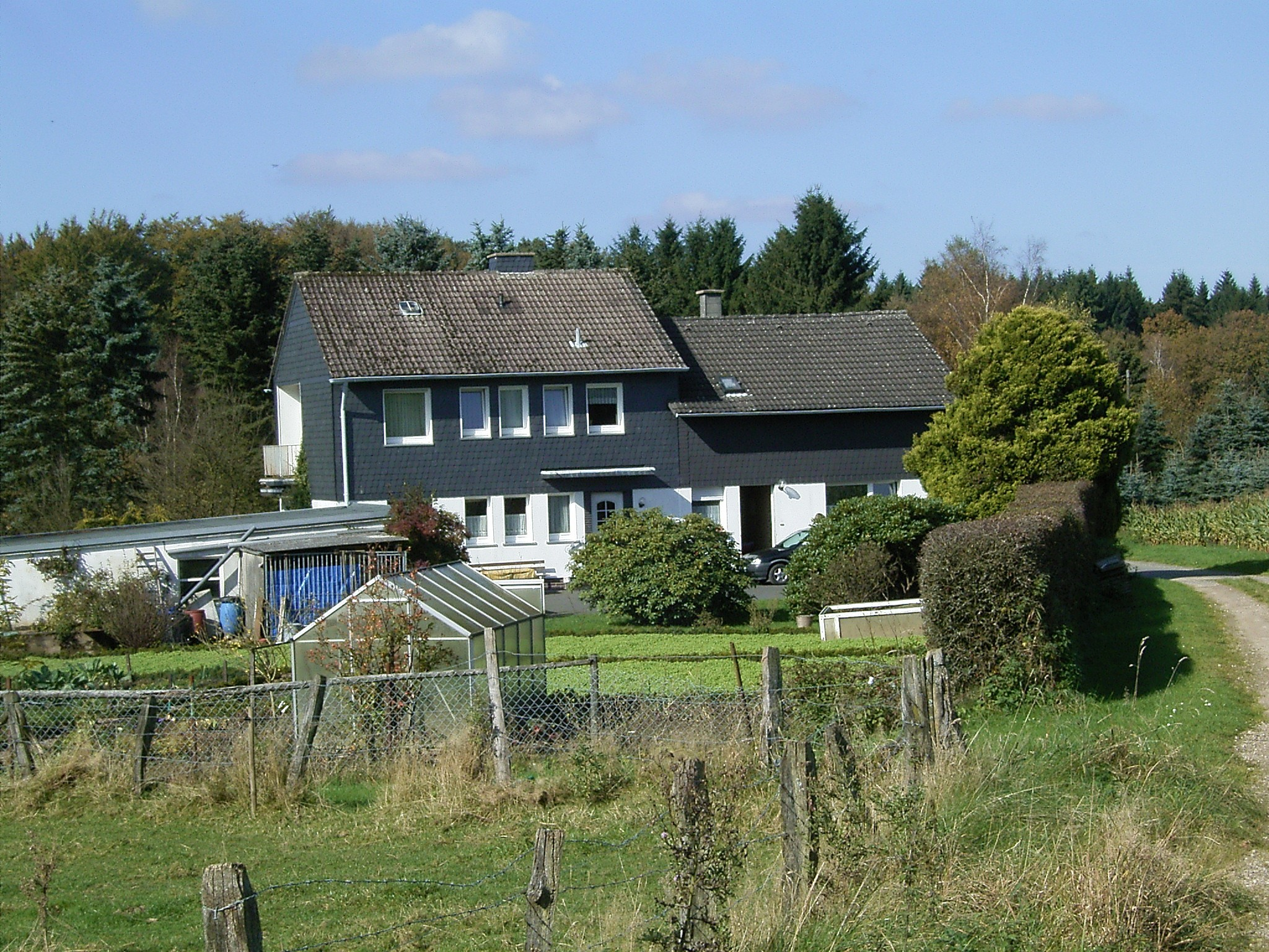 Radevormwald